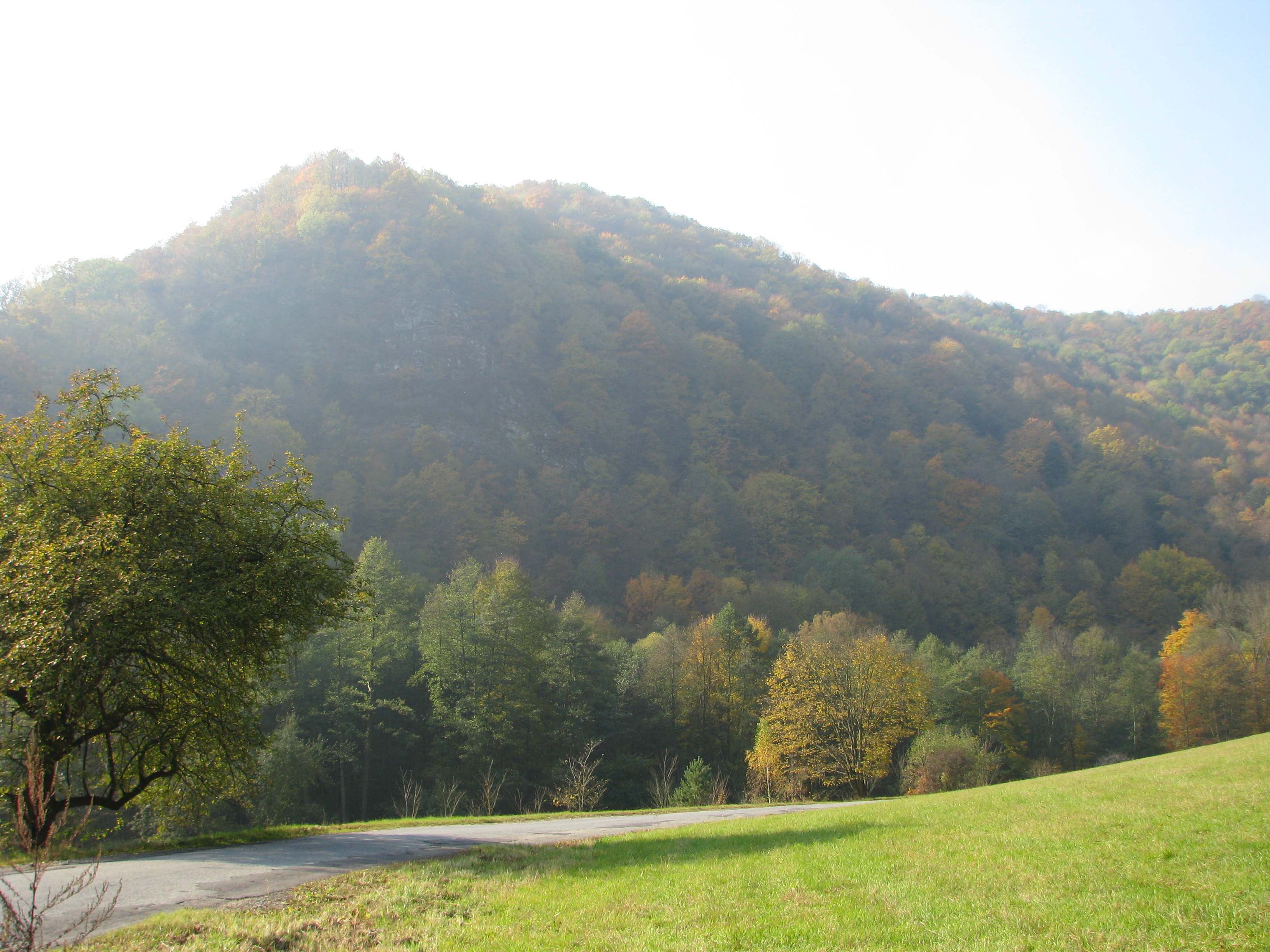 Nejznámější pohled na přírodní rezervaci Sokolí skála, z křižovatky Prudká-Běleč